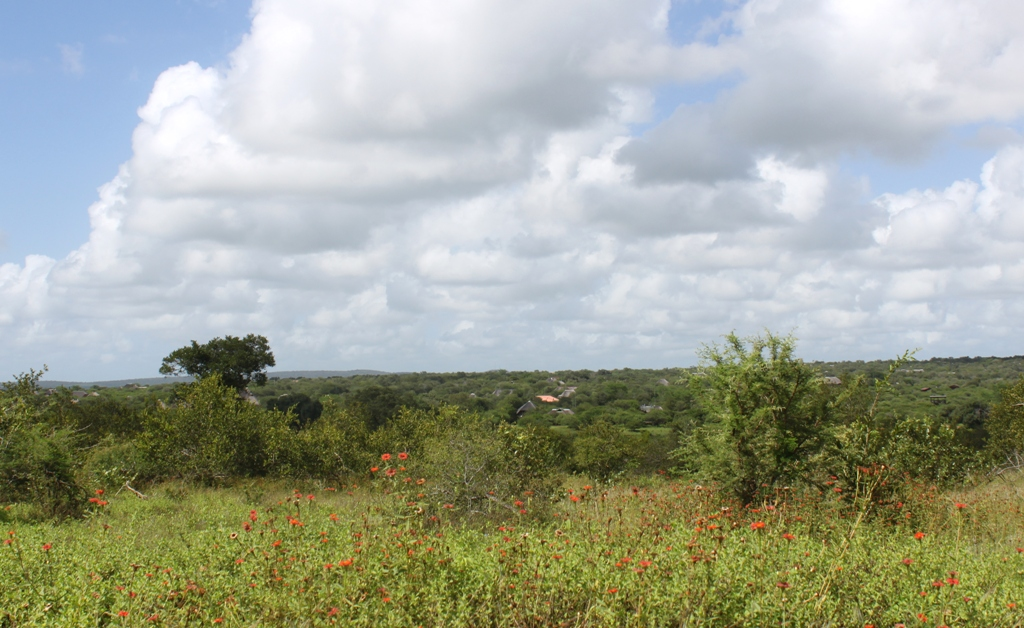 Blick vom Kruger Park über den Crocodile River auf den Marloth Park mit seinen im afrikanischen Busch verborgenen Häusern